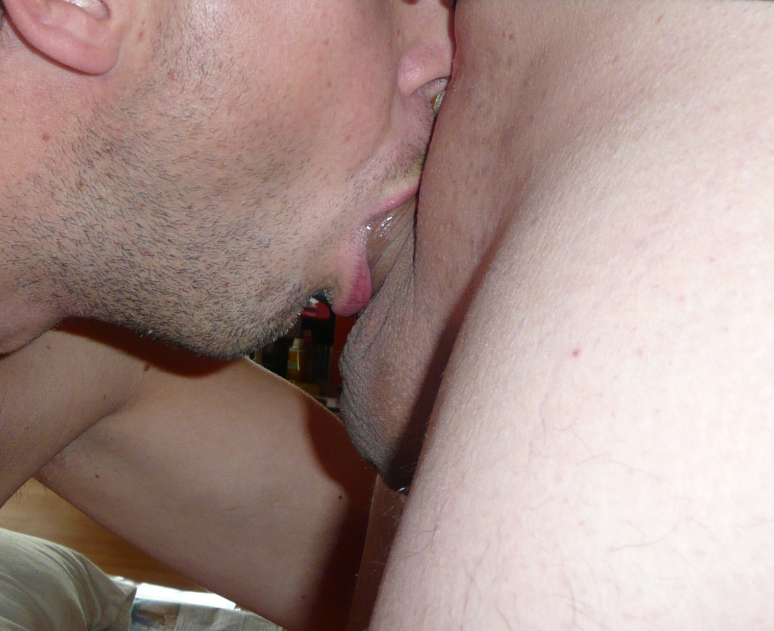 fellation